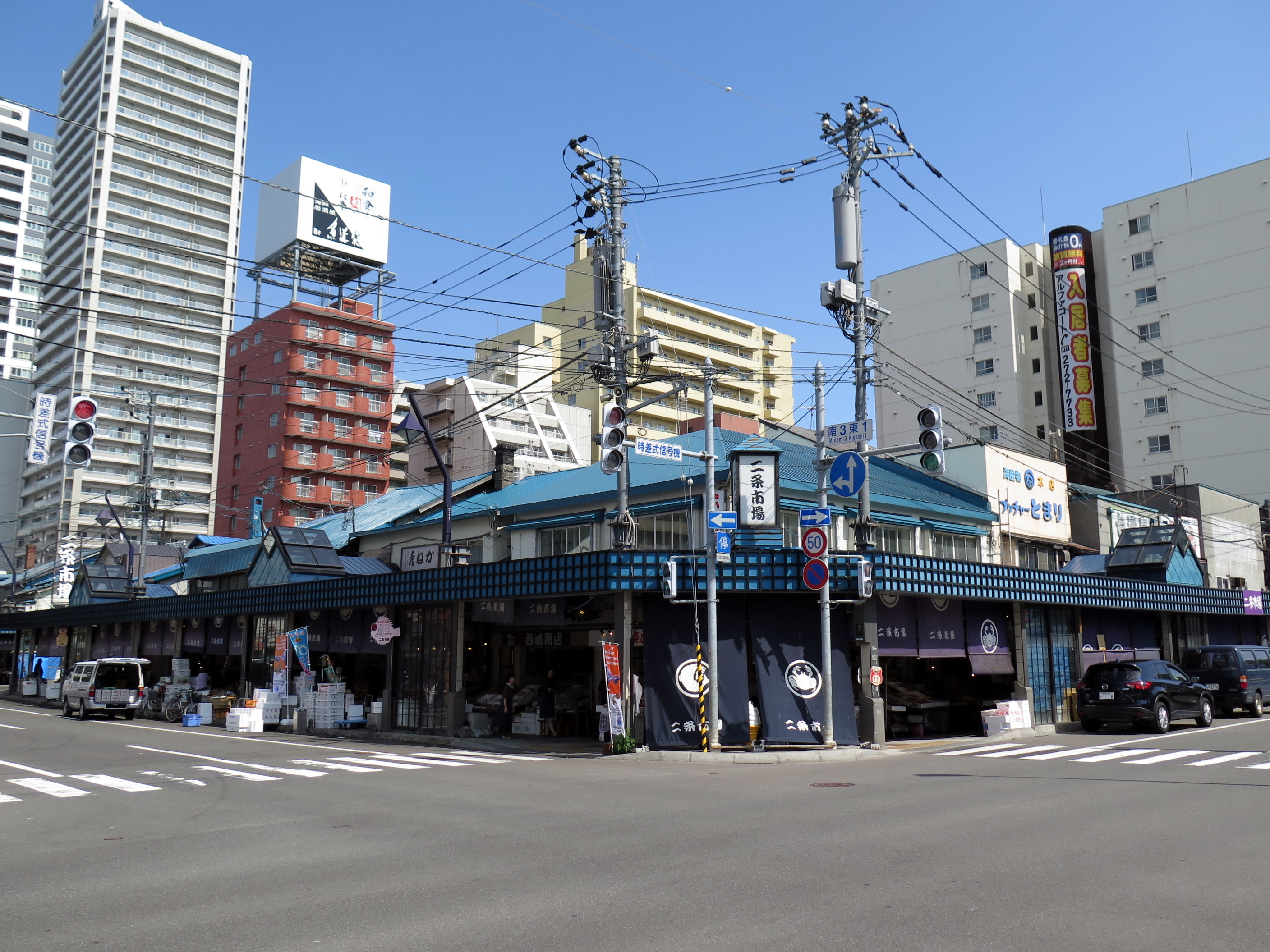 Nijo fish Market, Sapporo